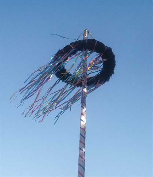 Meiboom, Maibaum in Kalkar, Germany